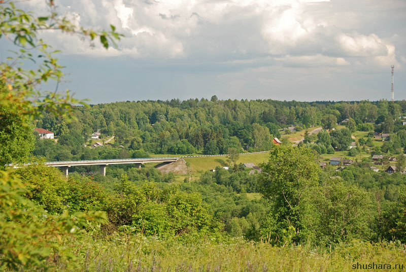 Молодотудский мост